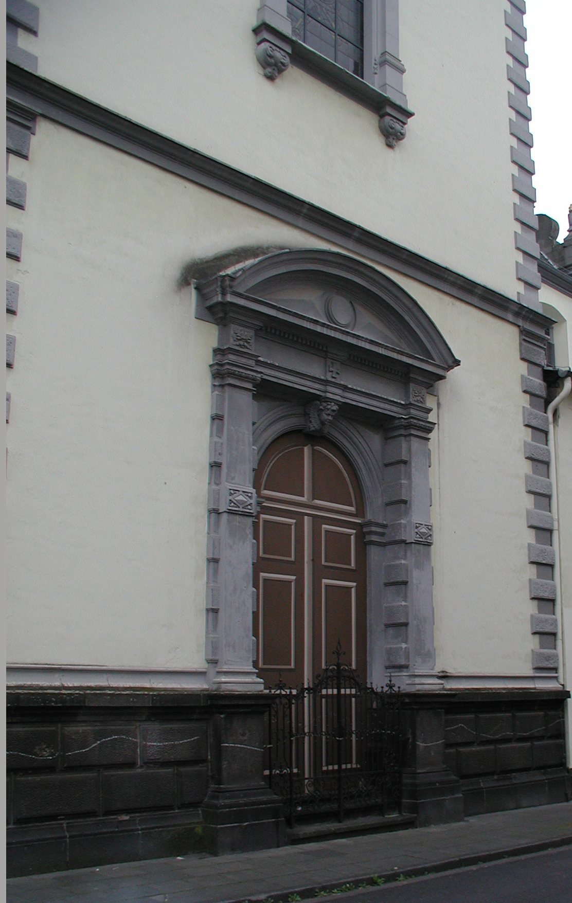 St. Maria vom Frieden, Köln